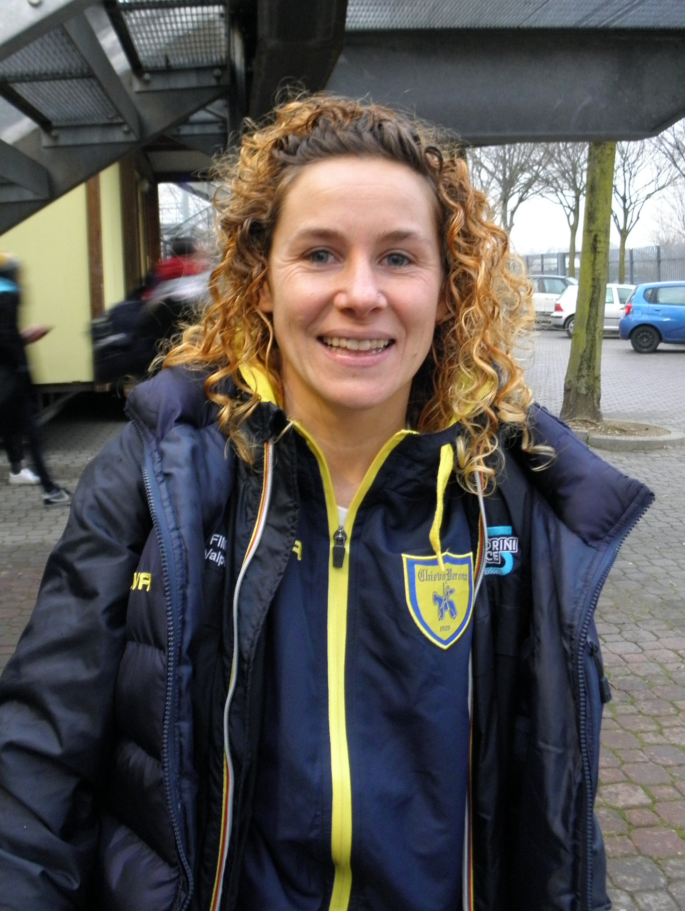 Verona, Stadio Aldo Olivieri: Valentina Boni al termine della Partita Fimauto Valpolicella - AGSM Verona del 17 febbraio 2018.